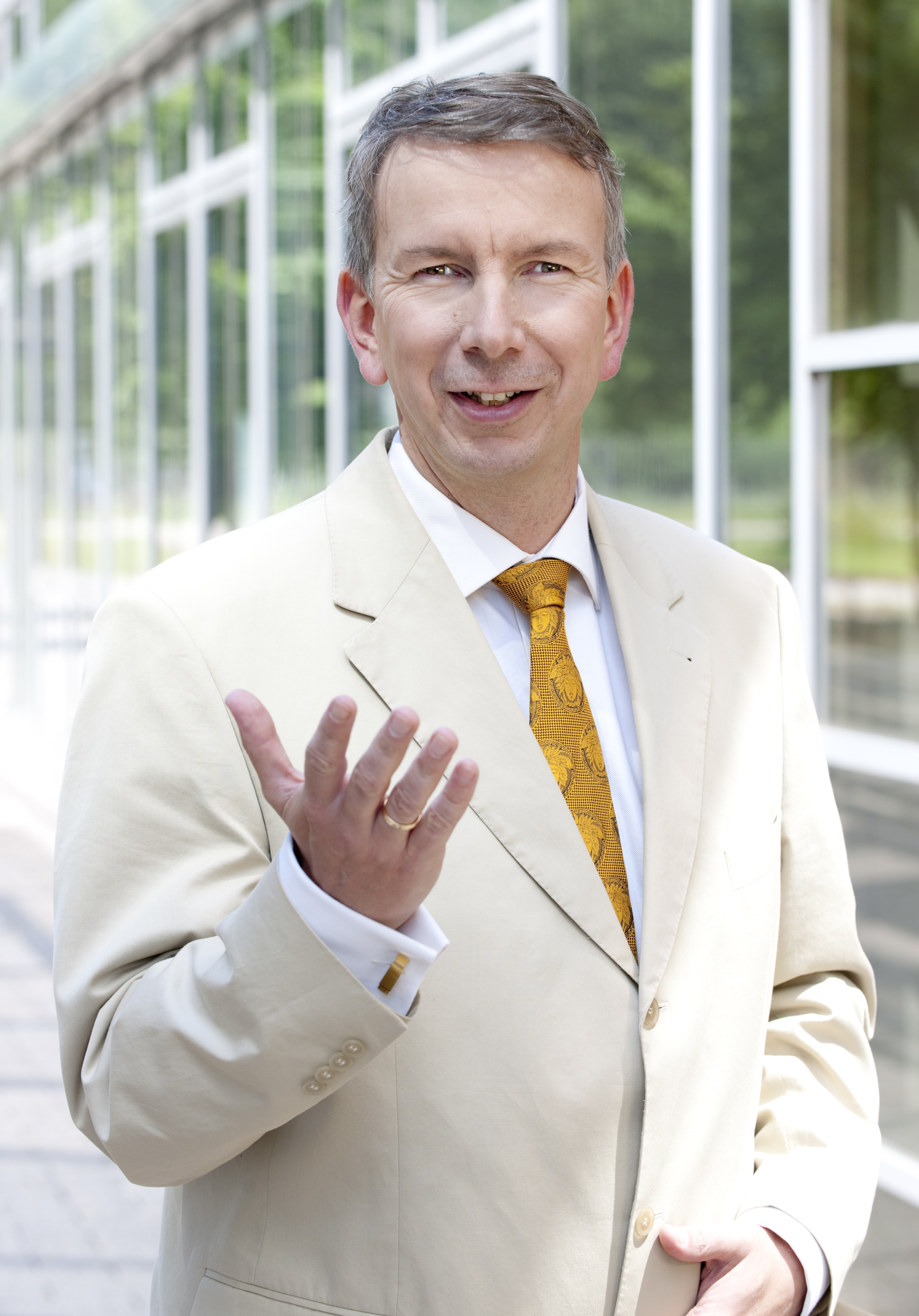 Der Unternehmer und Marketingwissenschaftler Prof. Dr. Michael Bernecker